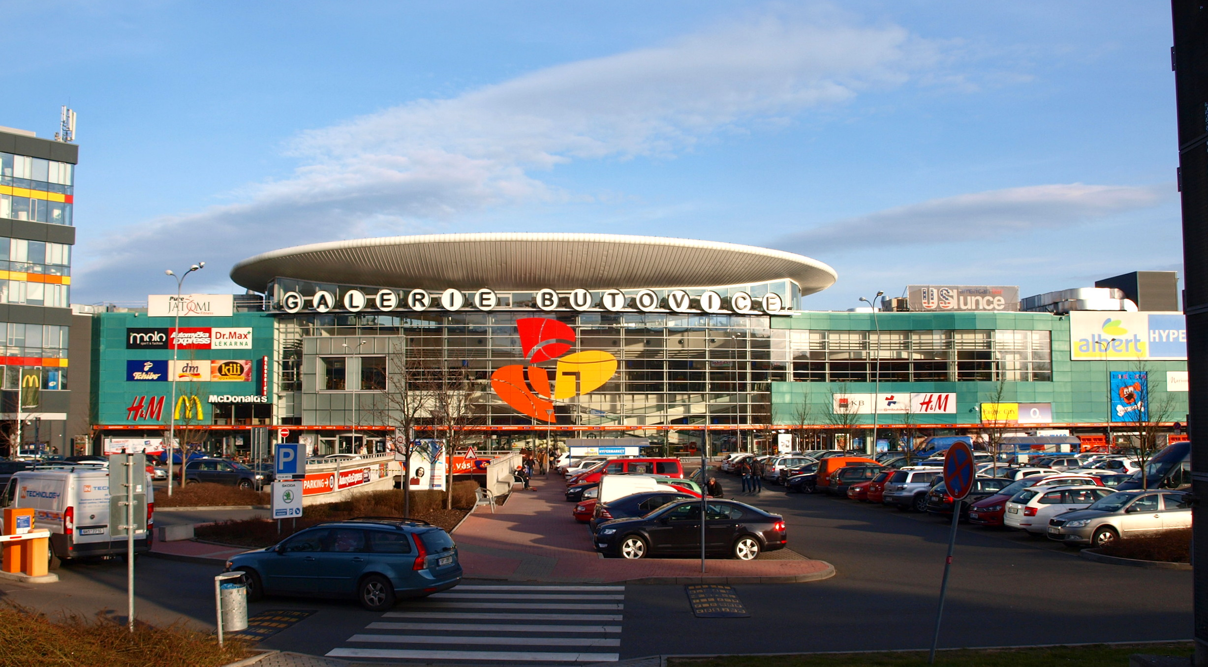 Galerie Nové Butovice